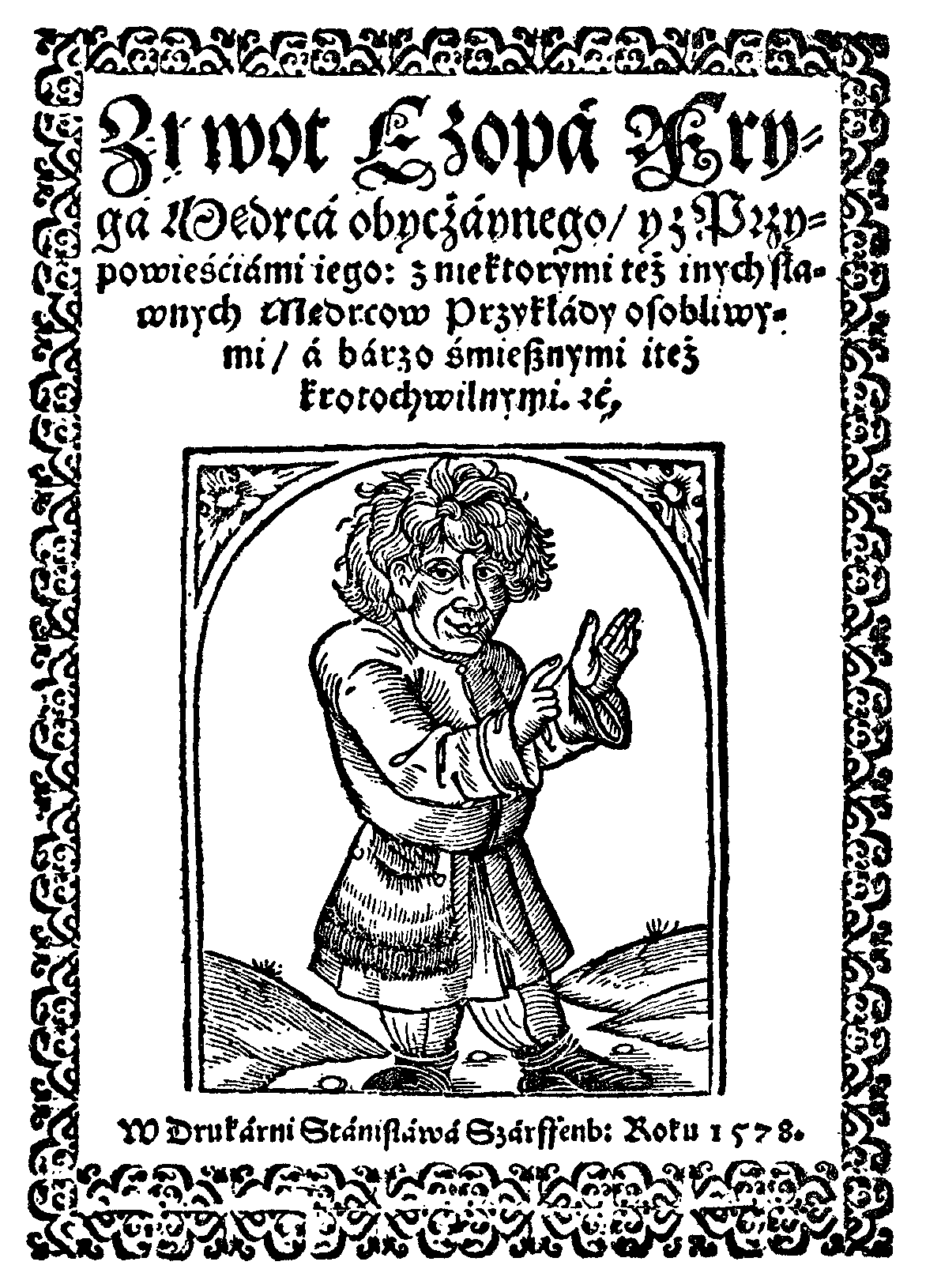 ilustracje z książki Biernata z Lublina Ezop (Ignacy Chrzanowski) wydanie krytyczne (wg edycji z r. 1578), Kraków 1910 Akademia Umiejętności w Krakowie